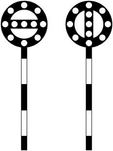 Железнодорожные сигналы «Начало опасного места», «Конец опасного места»